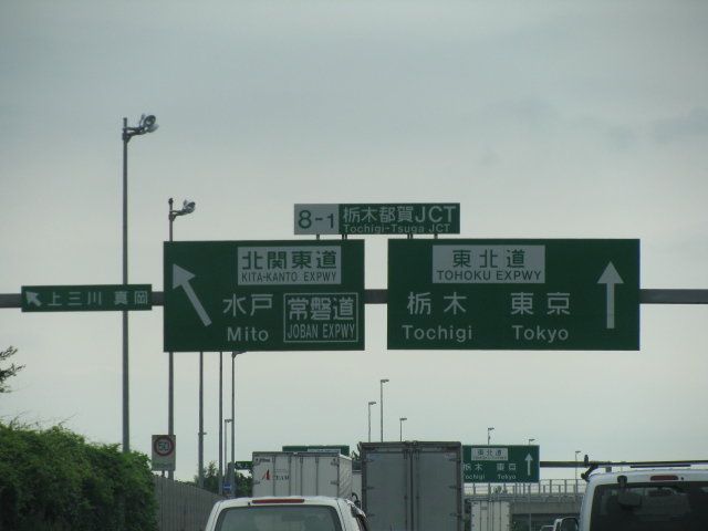 2009年8月11日、栃木都賀JCT付近で東北道上り方面より撮影